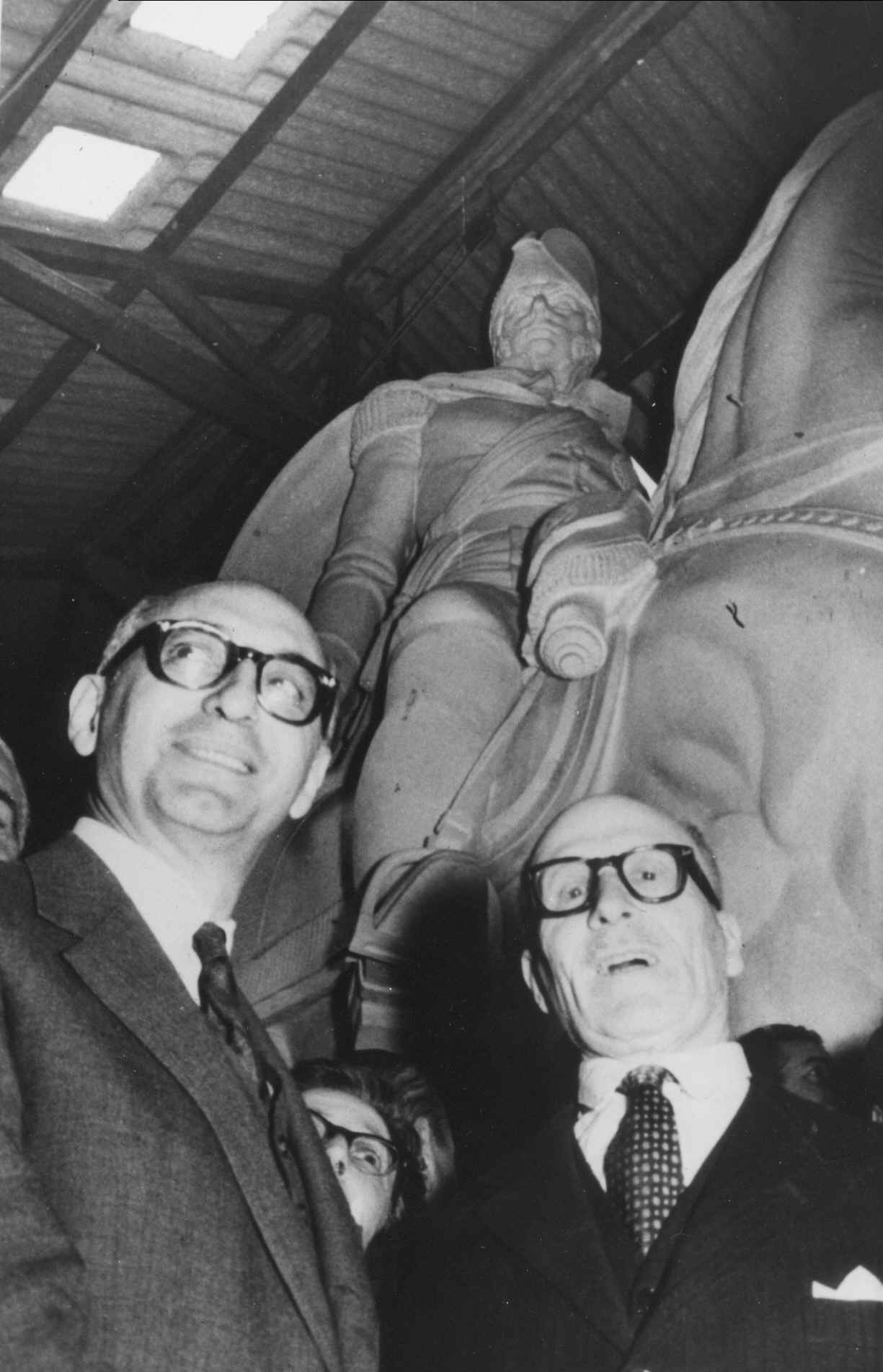 Encuentro entre el presidente argentino Arturo Frondizi (1958-1962) y el escultor uruguayo Edmundo Prati en su taller de Montevideo. Al fondo se aprecia la imponente estatua ecuestre en bronce del Gral. José de San Martín próximo a ser emplazado en la plaza ubicada sobre la Av. Agraciada en la confluencia de las calles Uruguayana y Grito de Asencio en el barrio montevideano de Bella Vista. Sin embargo, Frondizi no podría concurrir a la ceremonia de inauguración del monumento, ocurrida el 22 de noviembre de 1963, pues sería destituido por un golpe de Estado promovido por los militares el 29 de marzo de 1962.